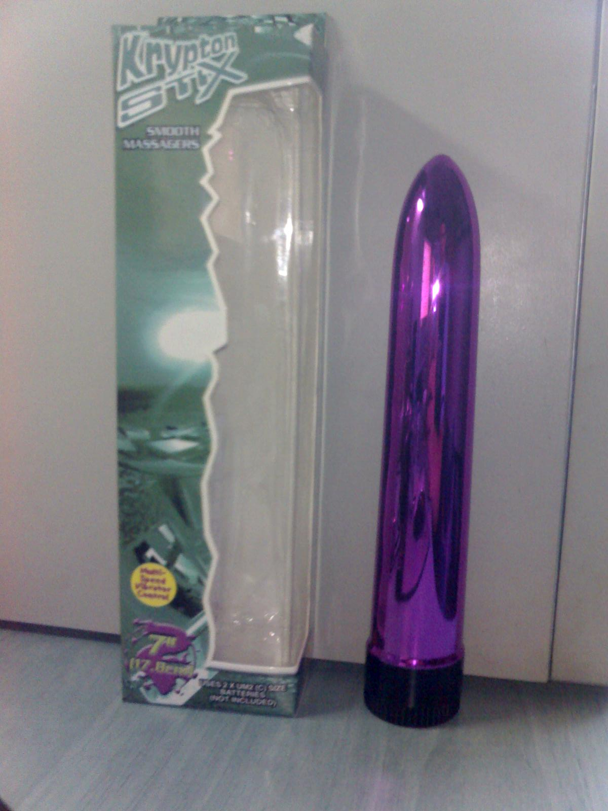 "Krypton Stix" vibrátor és csomagolása